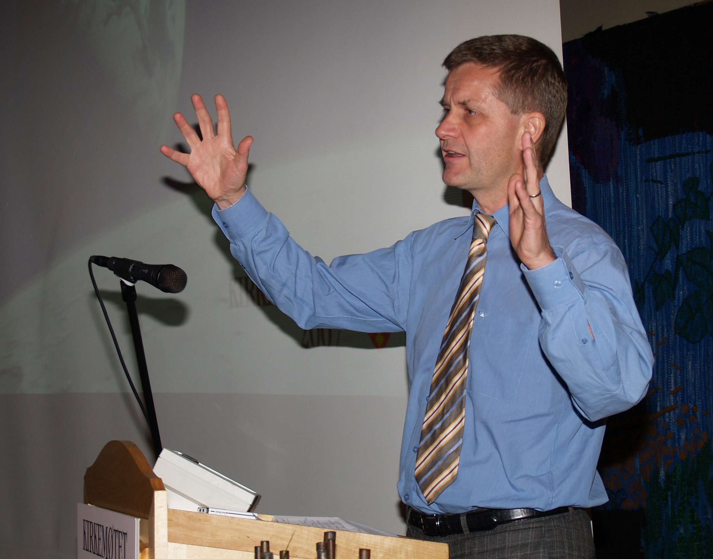 Statsråd Erik Solheim på den norske kirkes kirkemøte i 2007